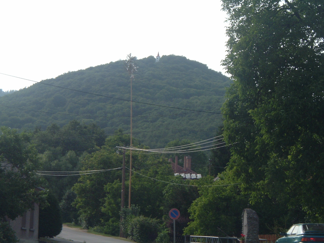 Saint Vid Chapel in Velem, Hungary